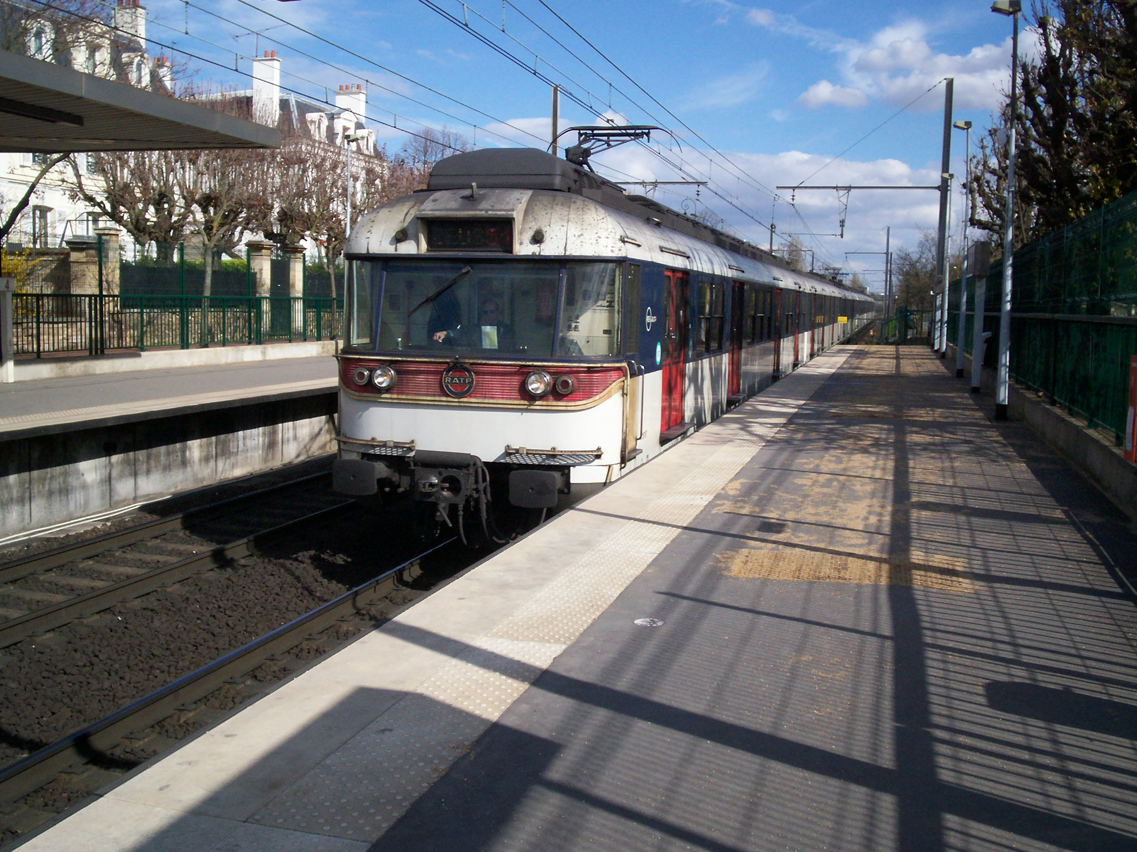 Rame MS61 arrivant en gare du Vésinet Centre